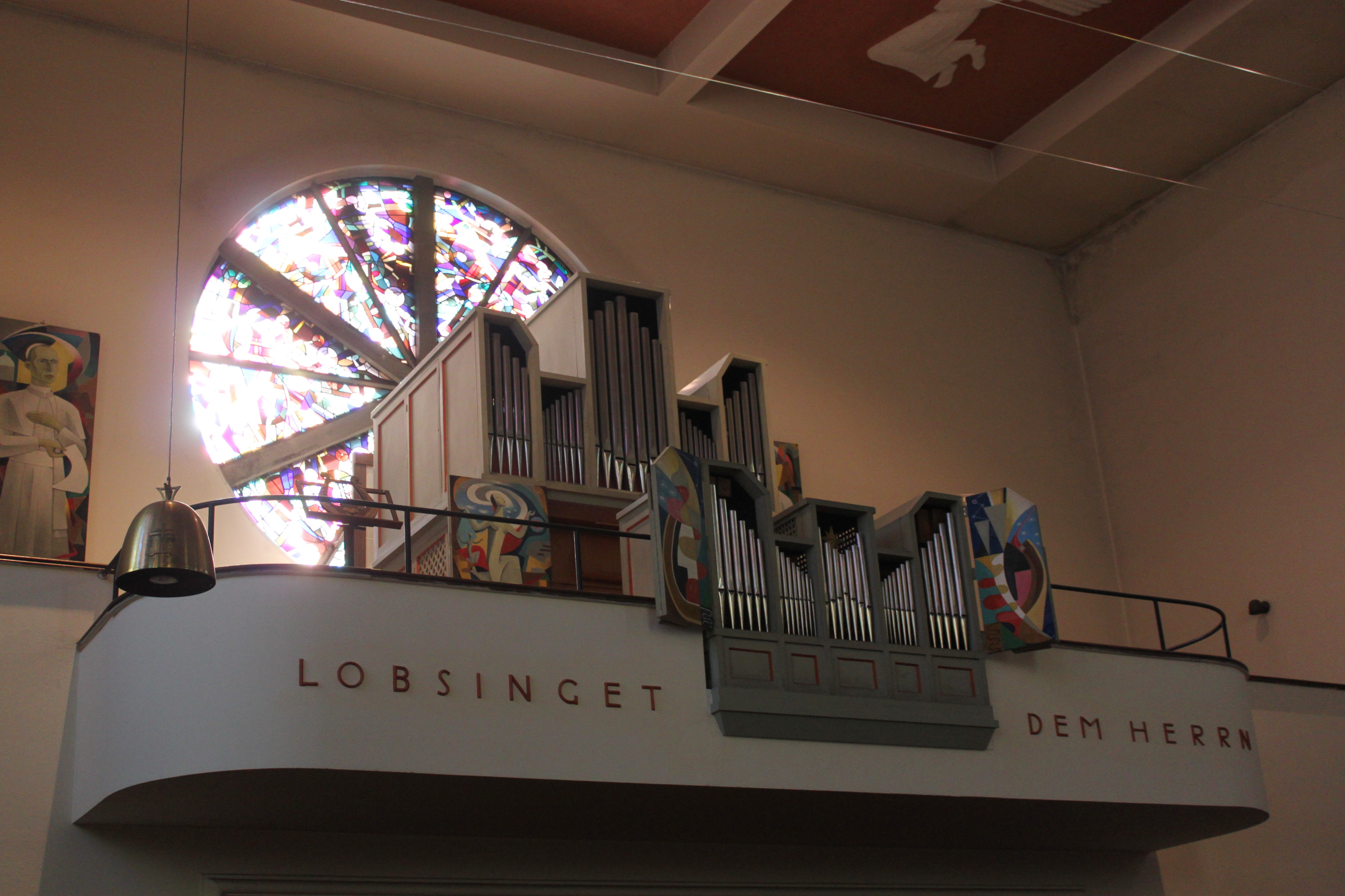 Pirchner-Orgel der Pfarrkirche Sandleiten, Wien 16, errichtet 1958.